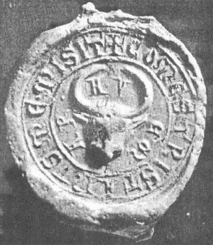 Hahót nembeli Terestyén (Trisztán) körpecsétje 1255-ből (ökörfej betűkkel)